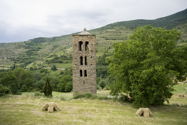 Campanar de Sant Martí de Bescaran